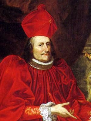 Ritratto del doge Agostino Spinola